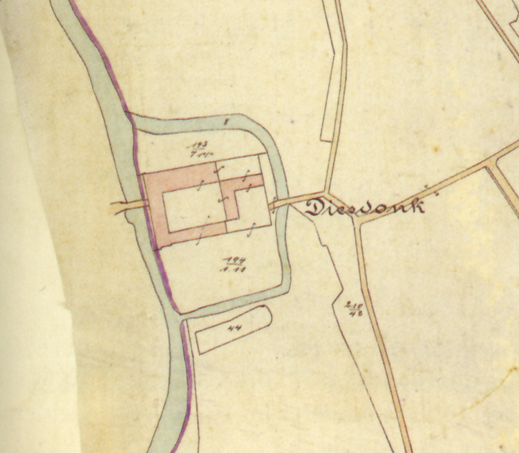 Haus Diesdonk in Geldern-Pont auf einer Katasterkarte um 1895